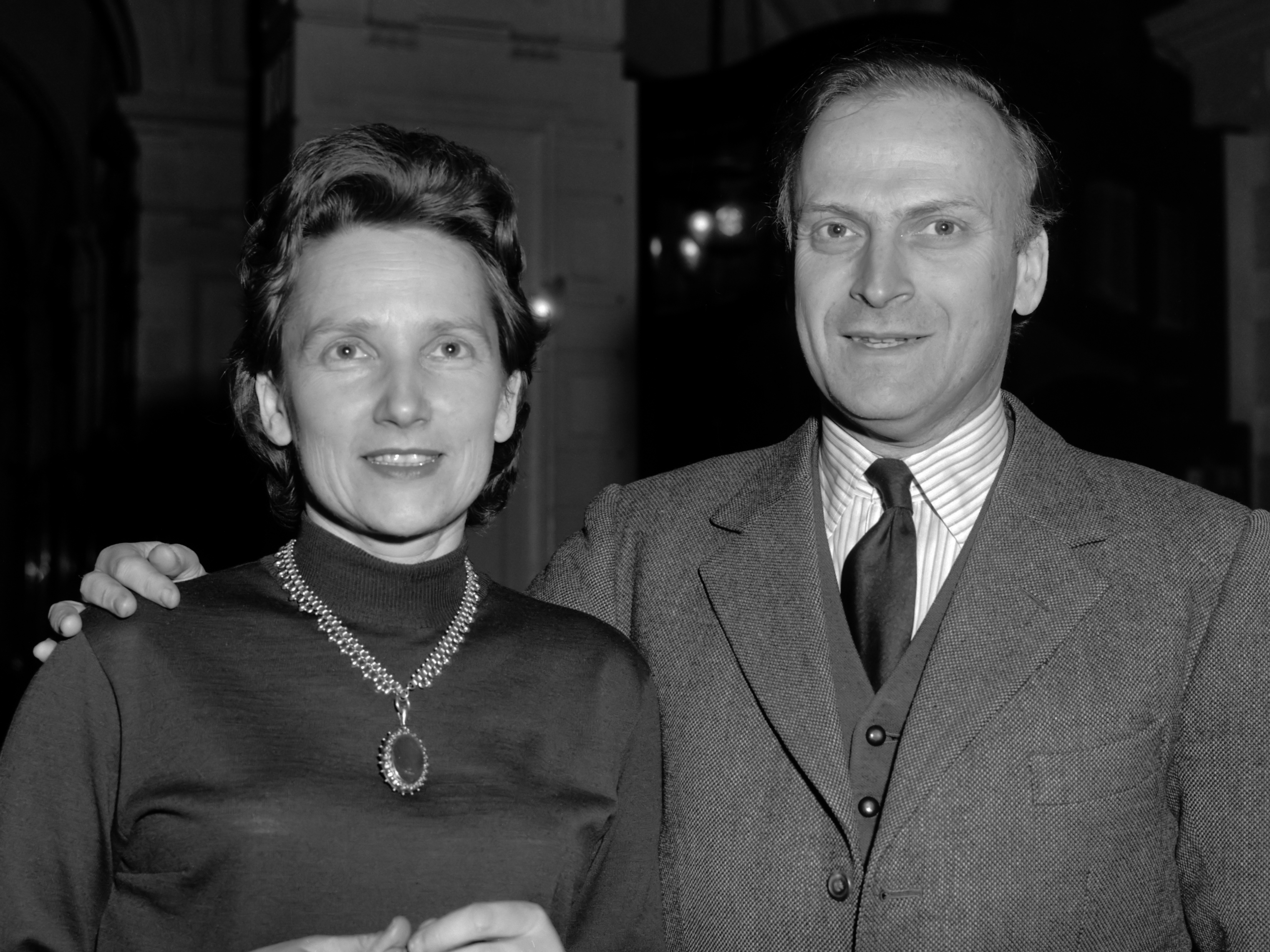 Broer en zuster Menuhin in Amsterdam voor jubileumconcert Amsterdams Concertgebouw 1 april 1963